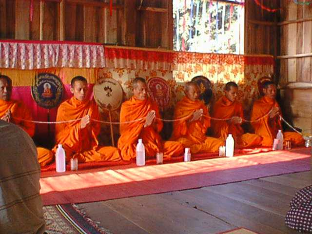 Monks chanting at a wedding ceremony in Ban Dongphayom, Nakhon Pa Mak, Bang Krathum, Phitsanulok, Thailand